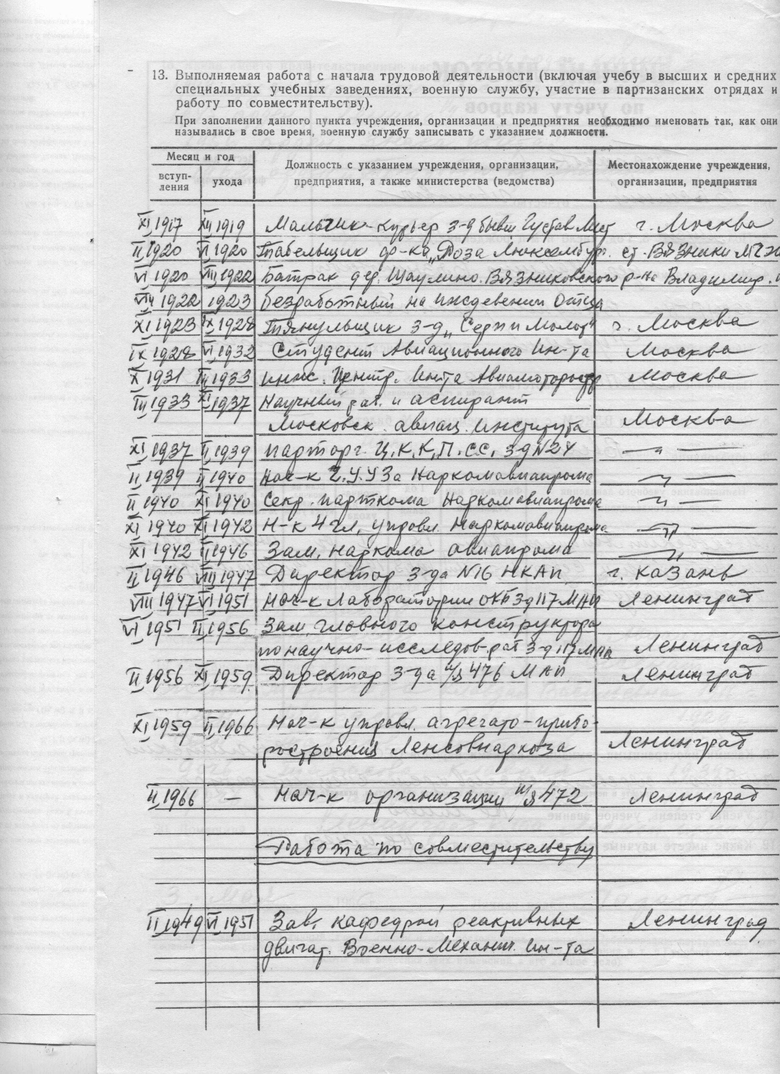 Стр 2 Личного листка по учету кадров, перешедшего на правах наследства